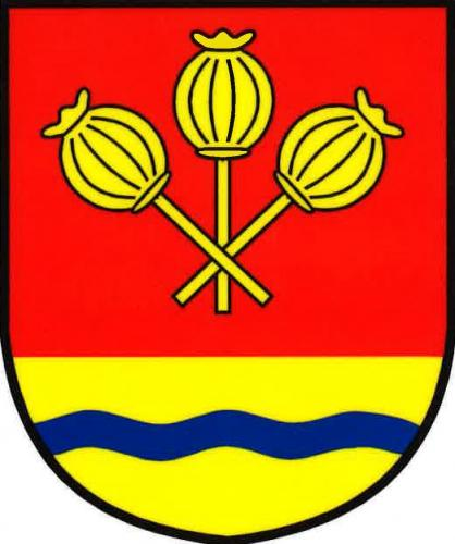 Makotřasy znak